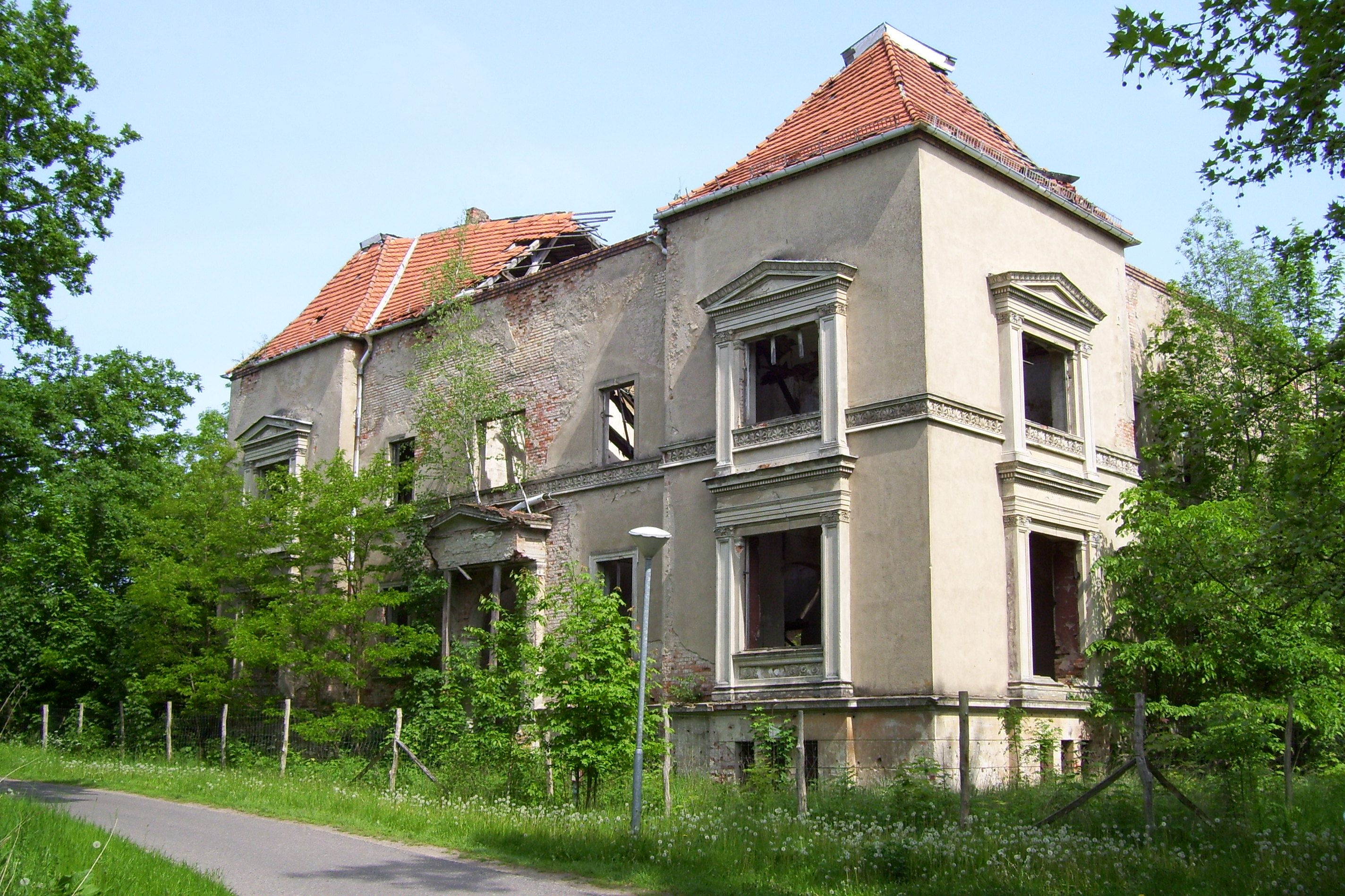 Schmoldow, Gemeinde Bandelin, Ruine des Herrenhauses, Westseite zur Dorfstraße